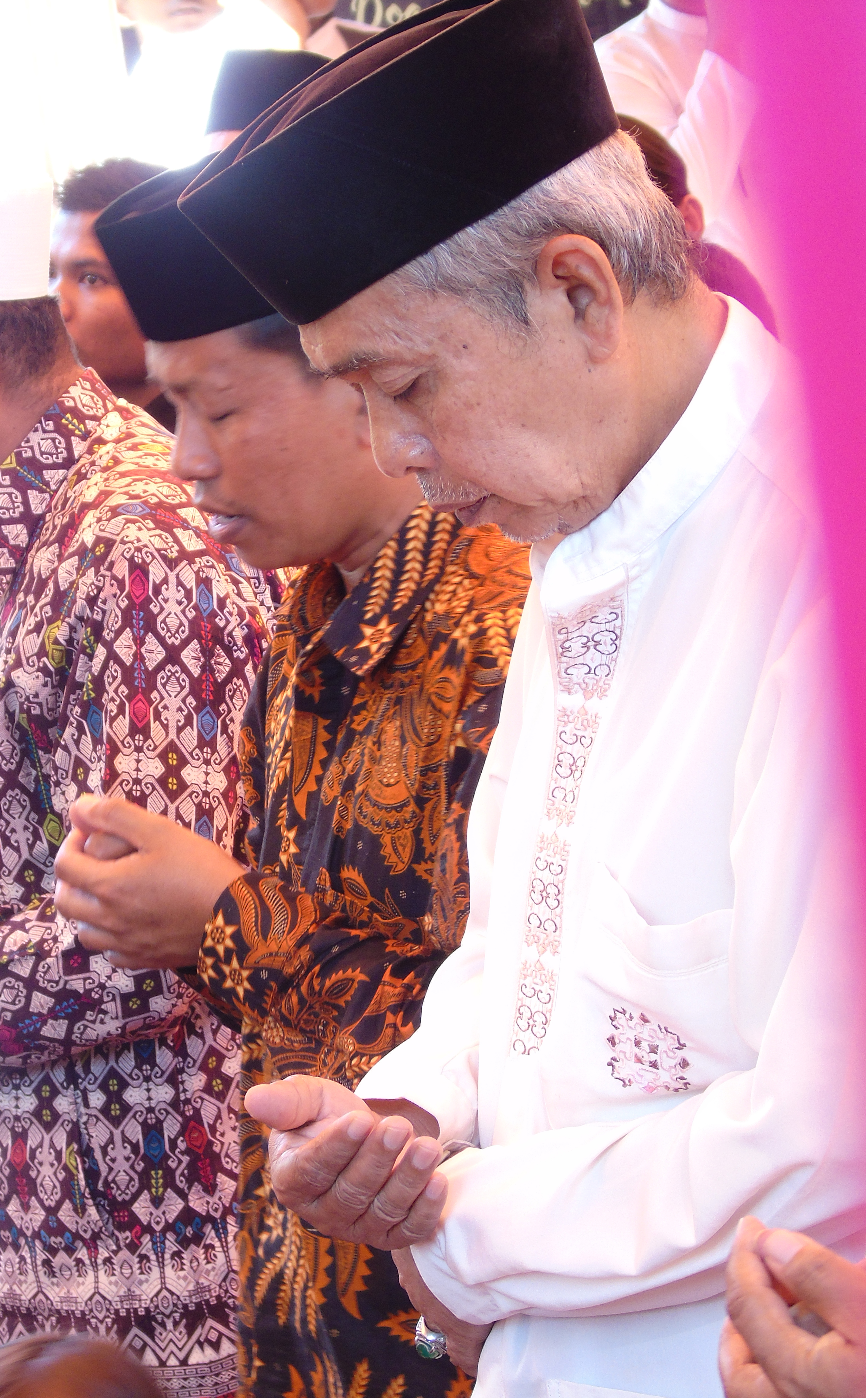 Kyai Muhammad Hodri Tohir saat menghadiri undangan walimatul ursy di probolinggo.